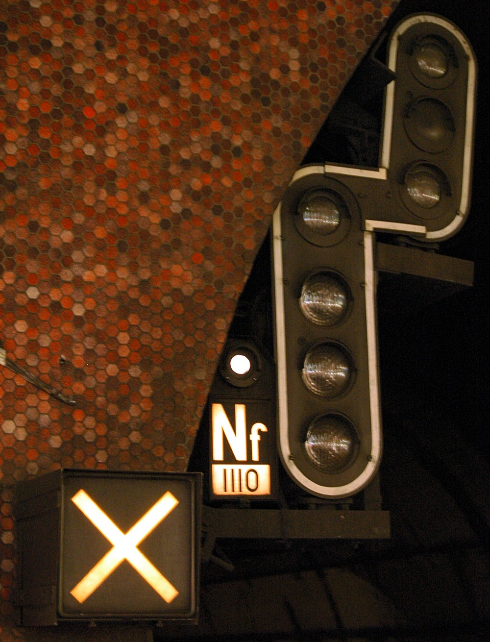 Effacement d'un signal BAL par le dispositif de contrôle embarqué SACEM (Croix de Saint André, X) à Nation RER A. Lateral signal taken over by SACEM system (Saint Andrew's Cross, X) at Nation station on Paris RER line A.